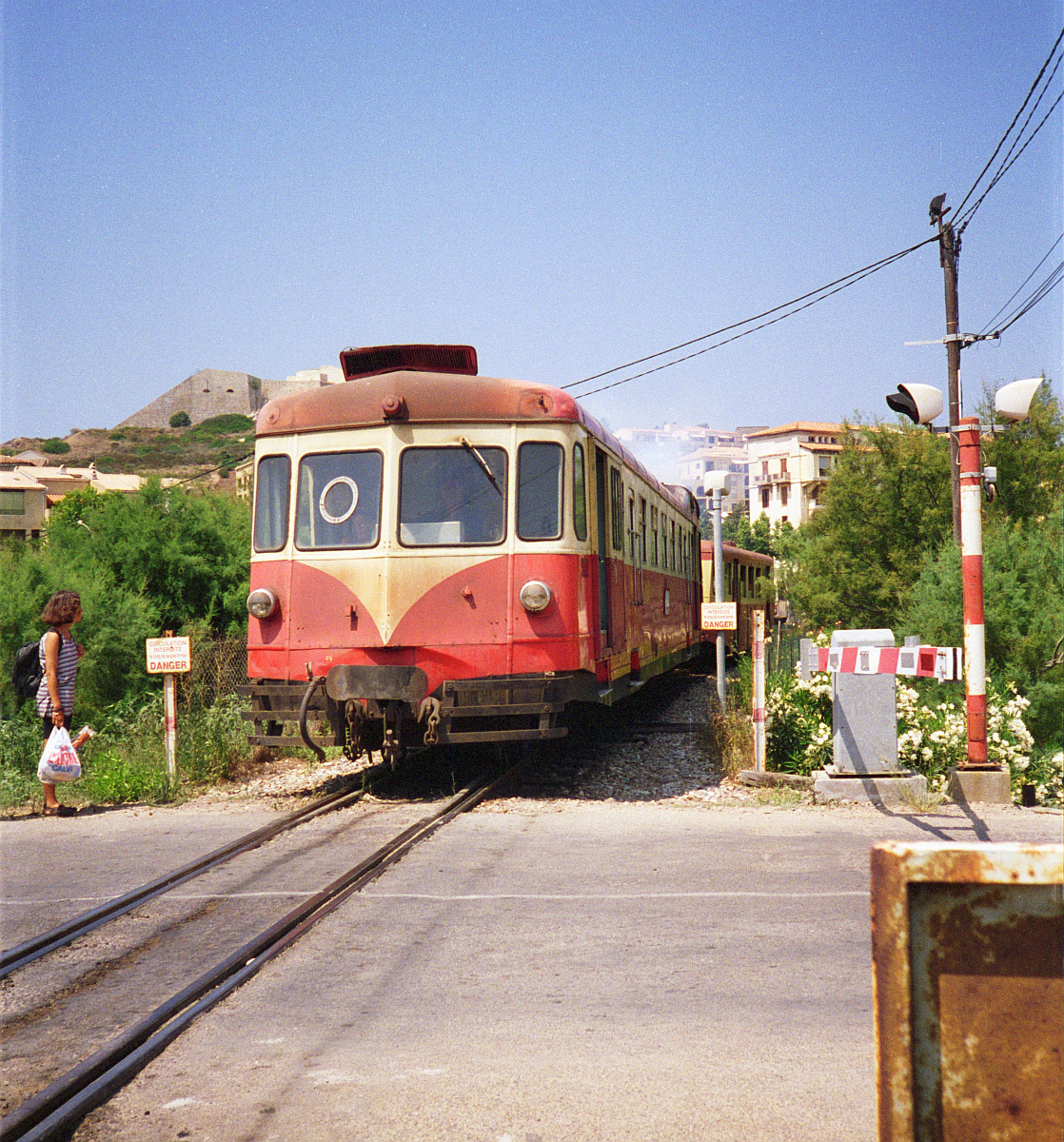 Un autorail ABH8 des tramways de la Balagne quitte la gare de Calvi le 10 août 1994.